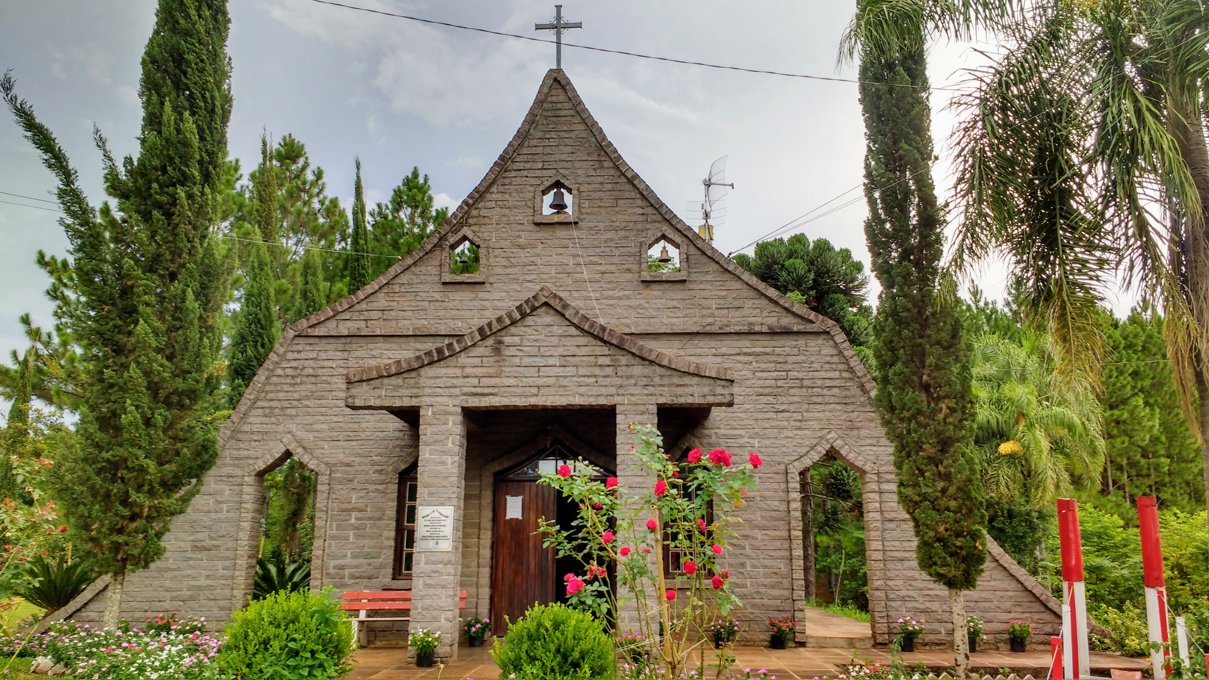 Santuário Nossa Senhora de Fátima, localizado no distrito de Buriti, em Santo Ângelo, Rio Grande do Sul.